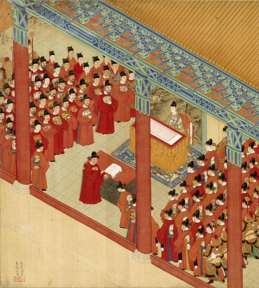 經筵進講，時年四十七